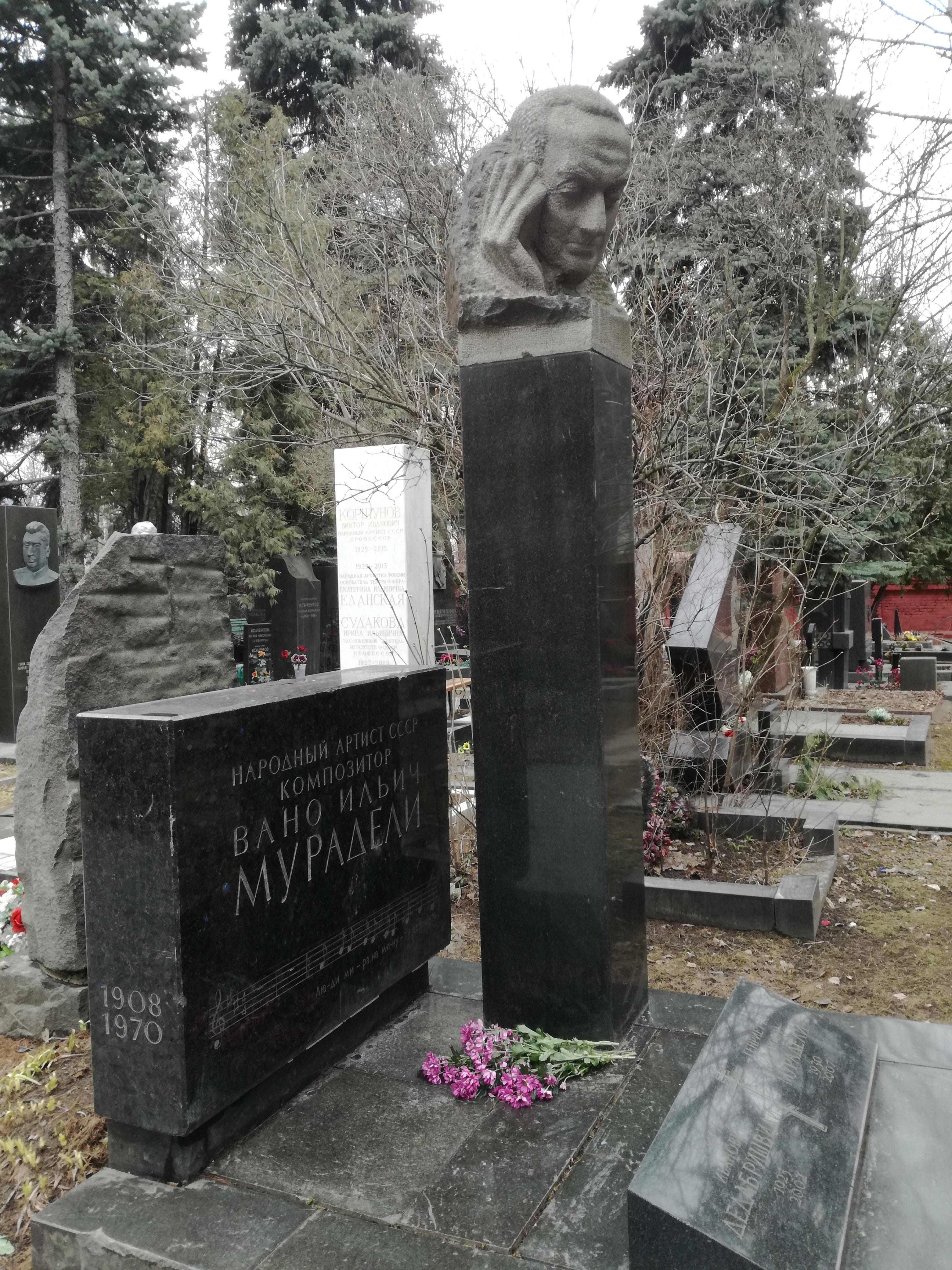 Новодевичье кладбище